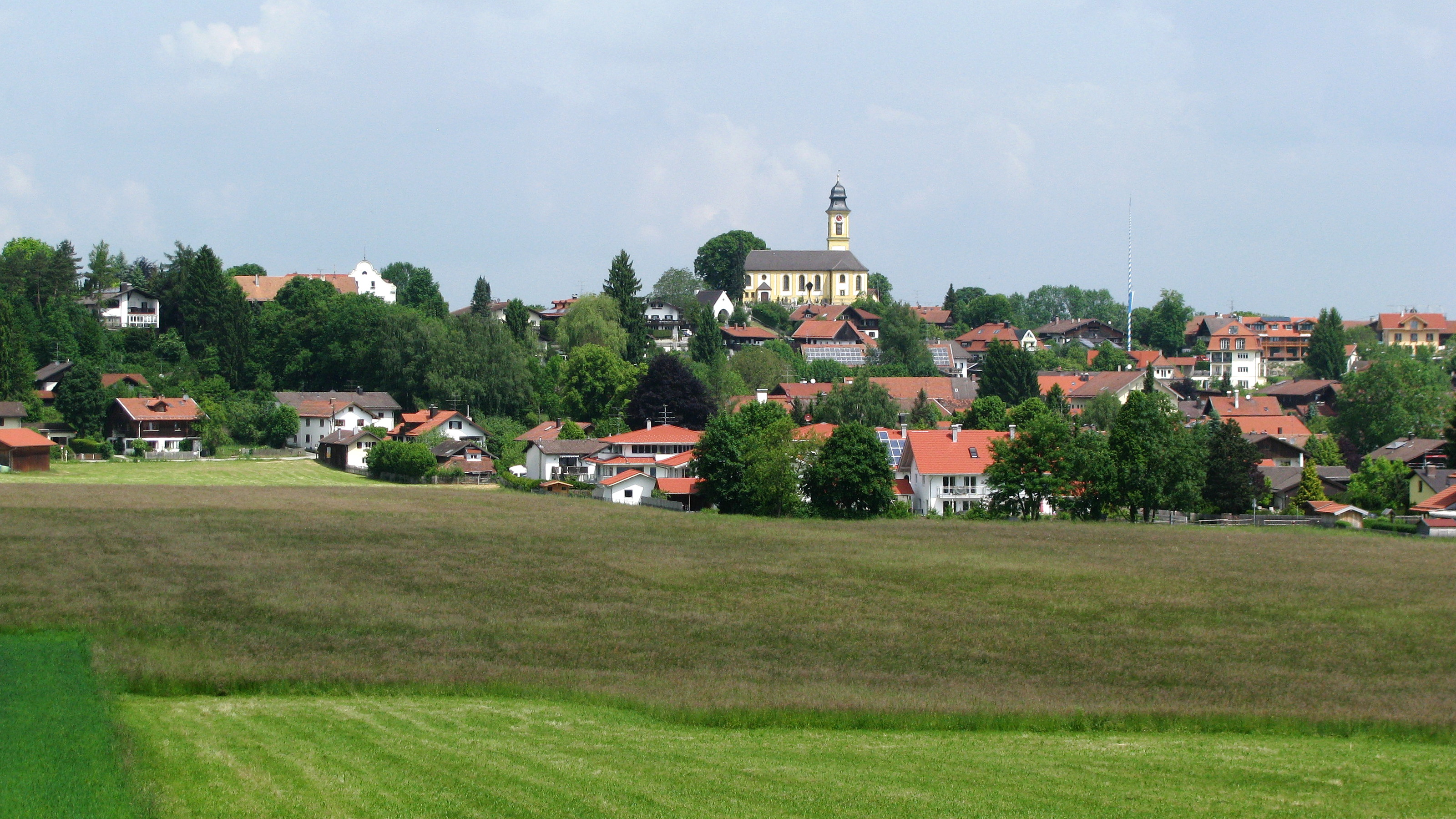 Hohenschäftlarn aus südlicher Richtung.